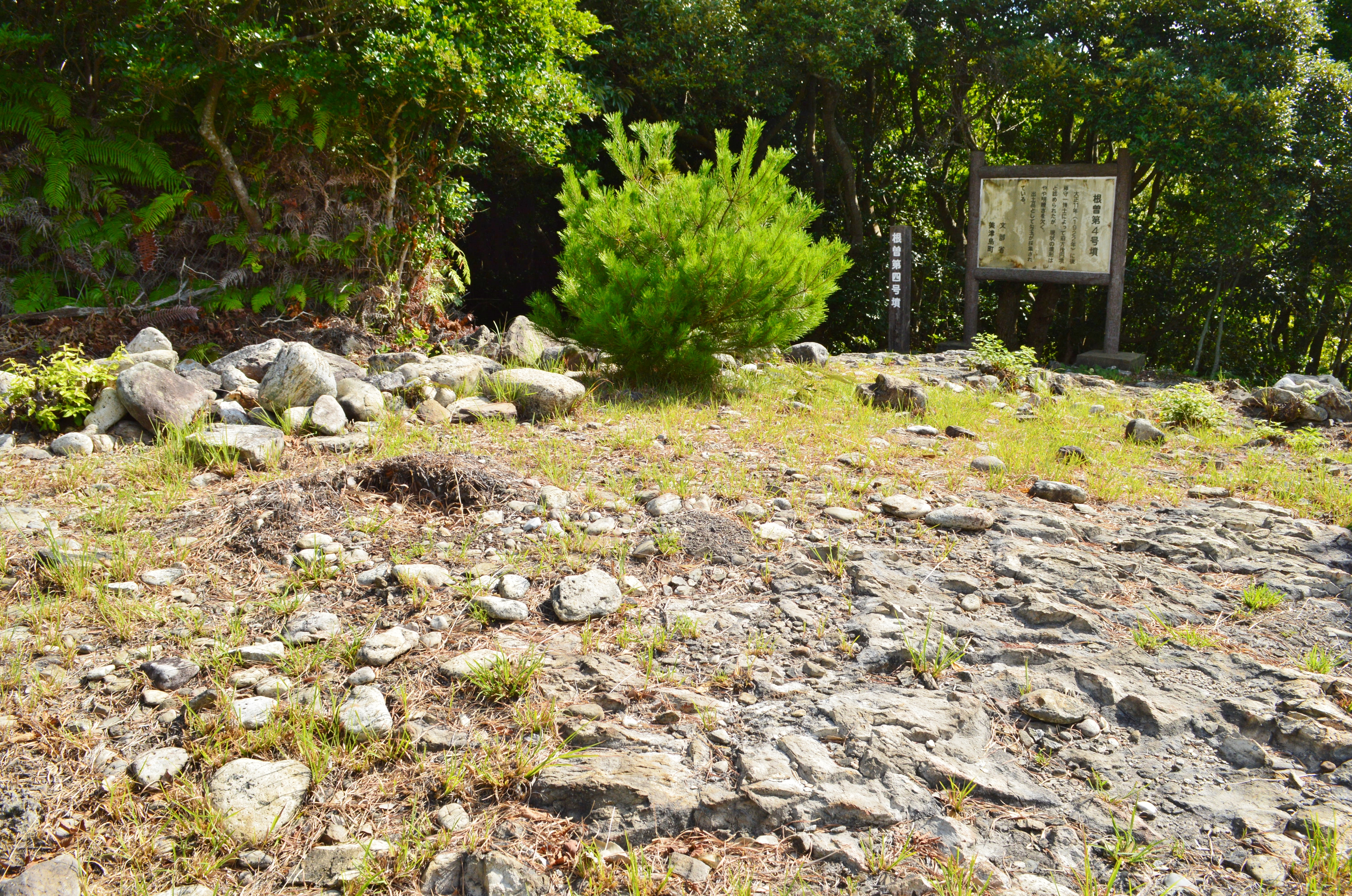 根曽第4号墳 墳頂